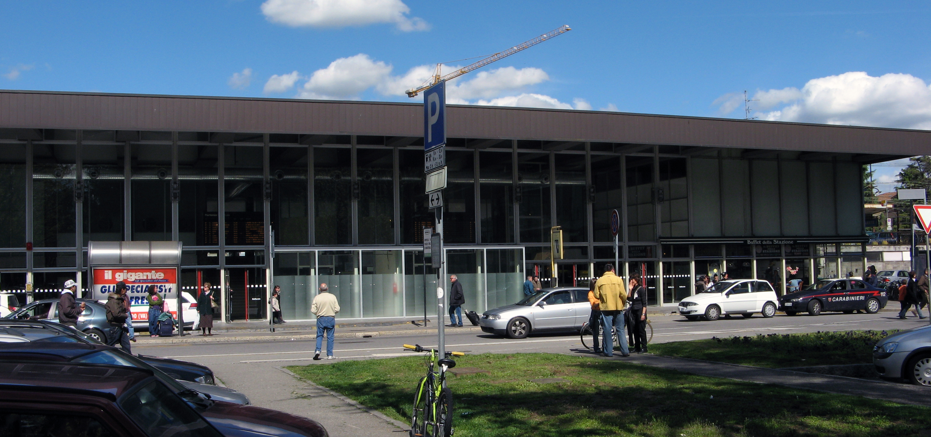 Stazione di Gallarate (Varese, Italy)